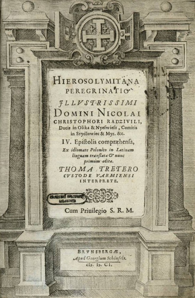 Беларуская (тарашкевіца): Тытульны аркуш "Пэрэгрынацыі" М. К. Радзвіла